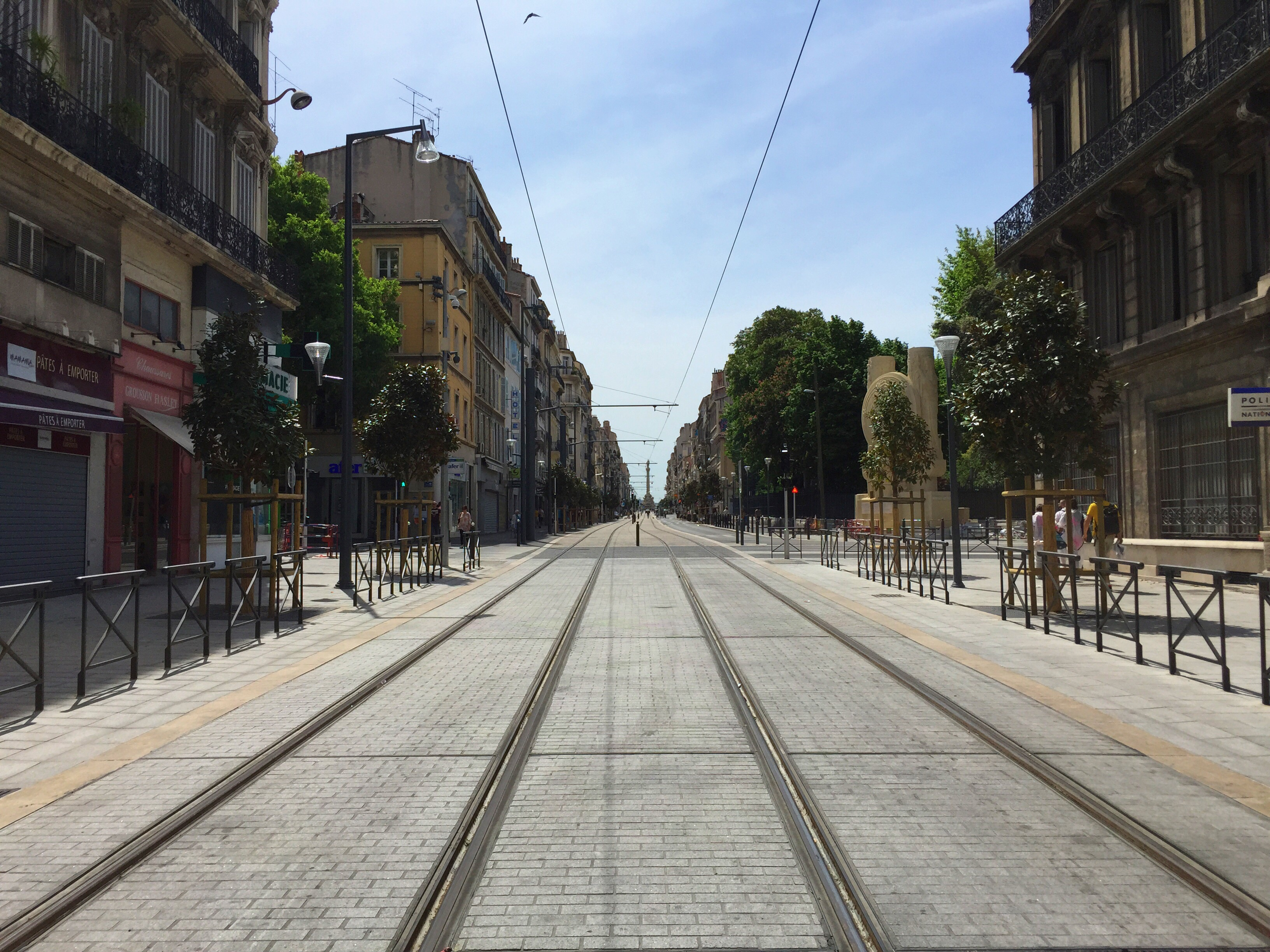 La rue de Rome réhabilitée en 2015 (Marseille, France)